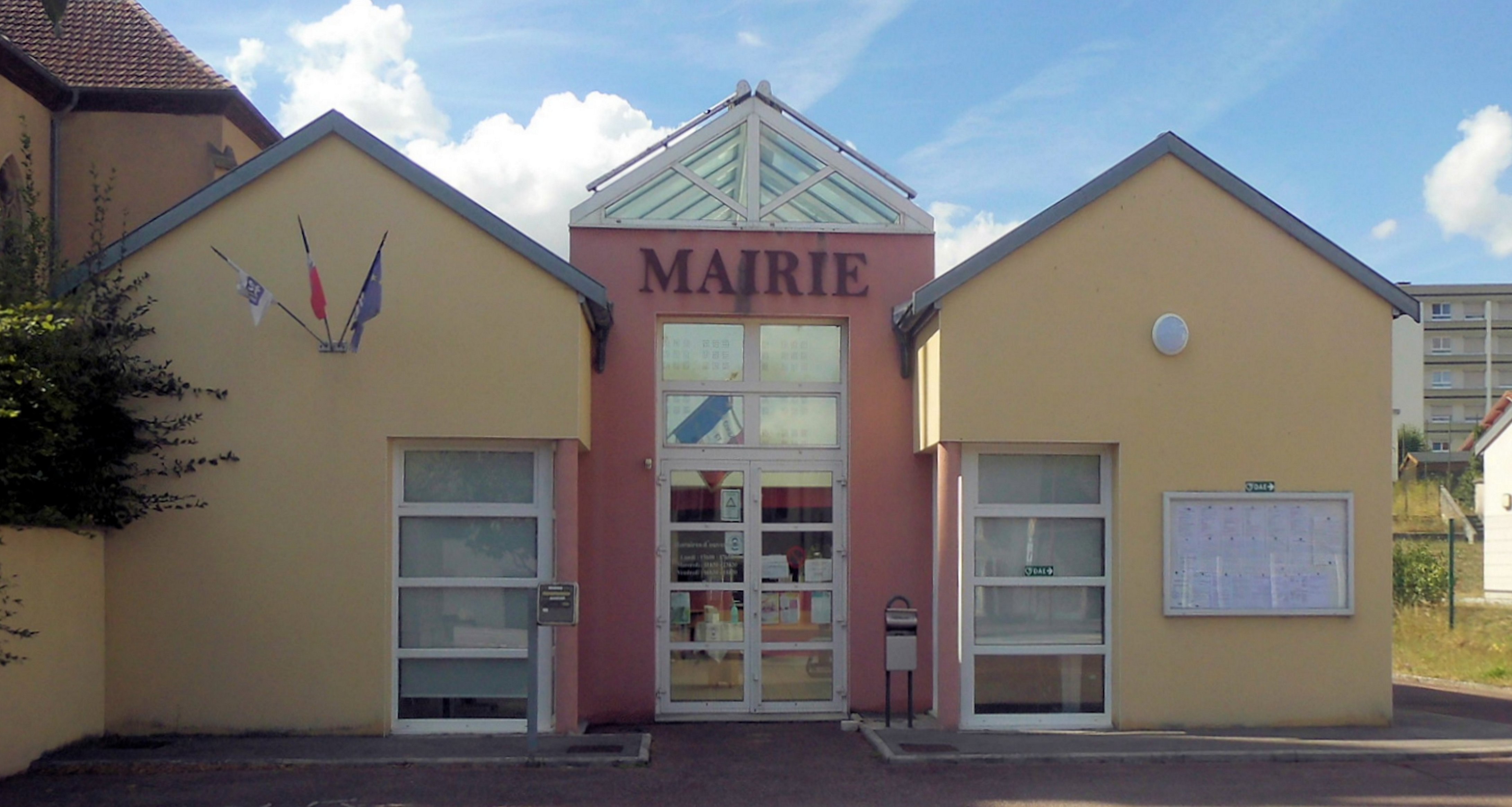 La mairie d'Hymont